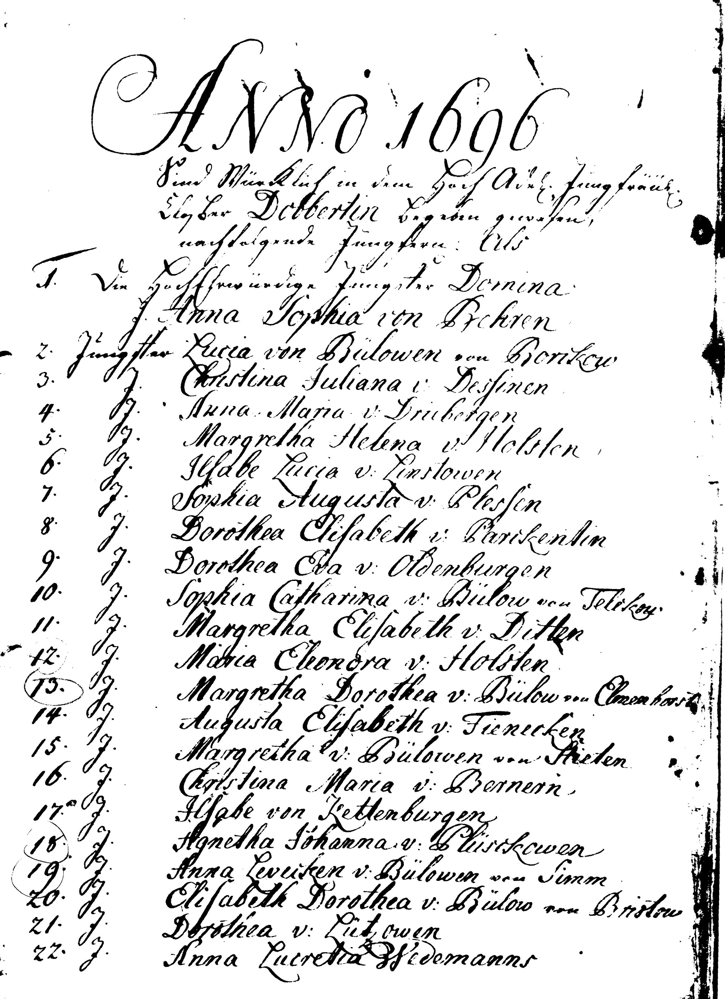 Erste Seite des Einschreibebuchs des Klosters Dobbertin